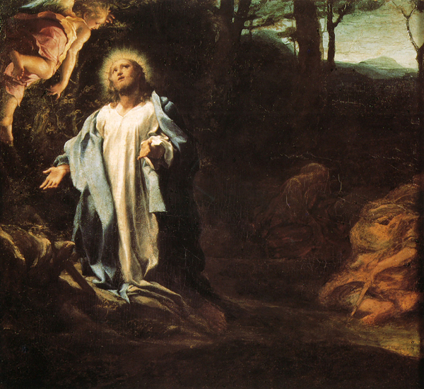 Correggio, orazione nell'orto, apsley house